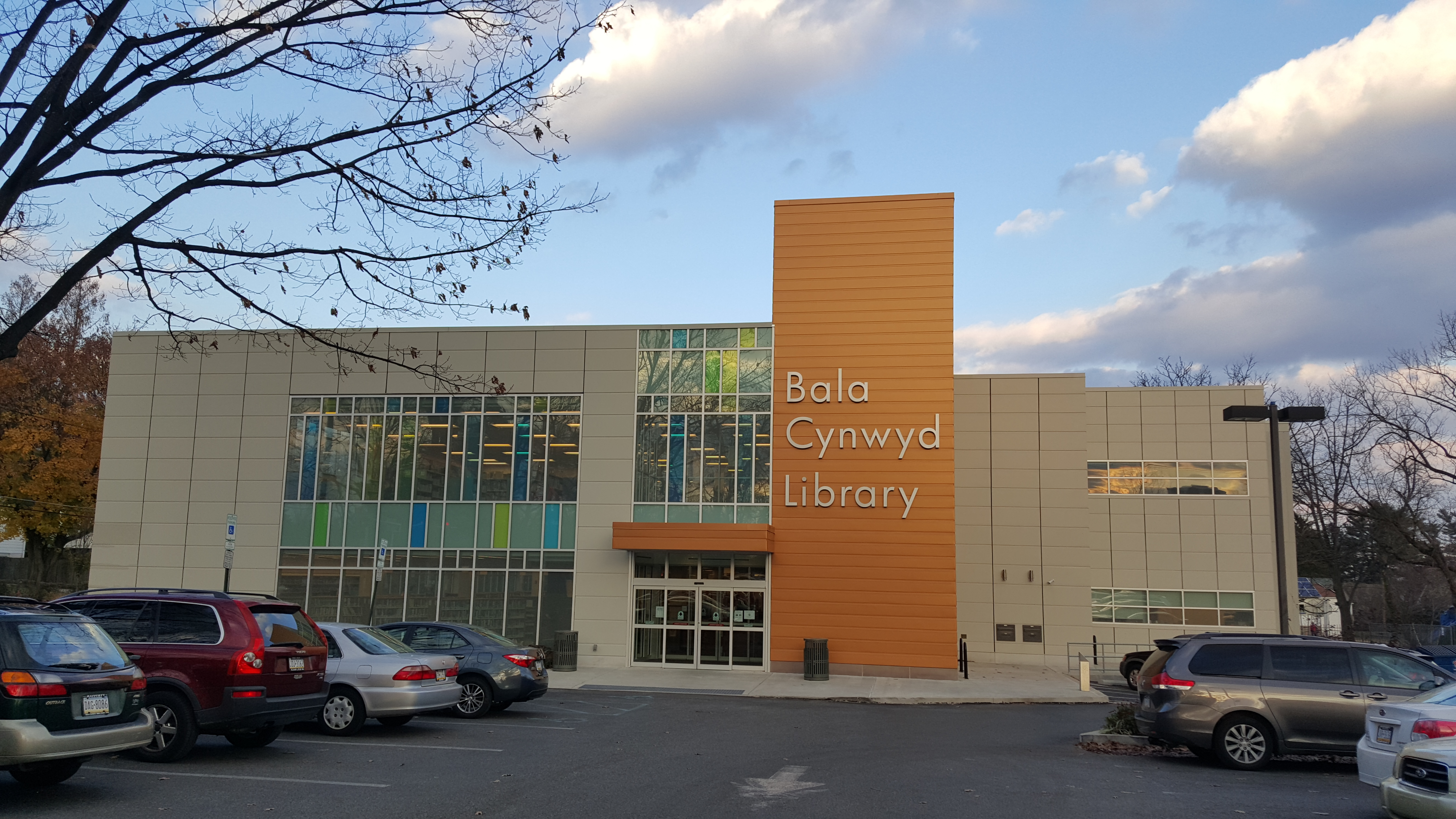 Bala Cynwyd Library of the Lower Merion Library System